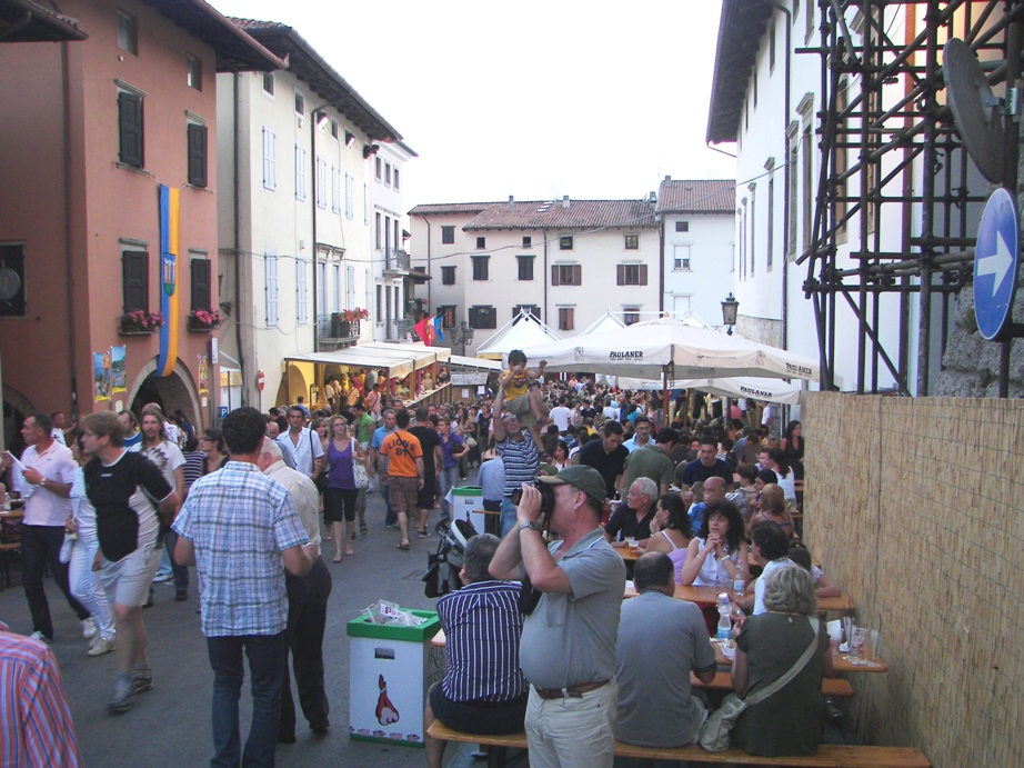 Schinkenfestin San Daniele del Friuli